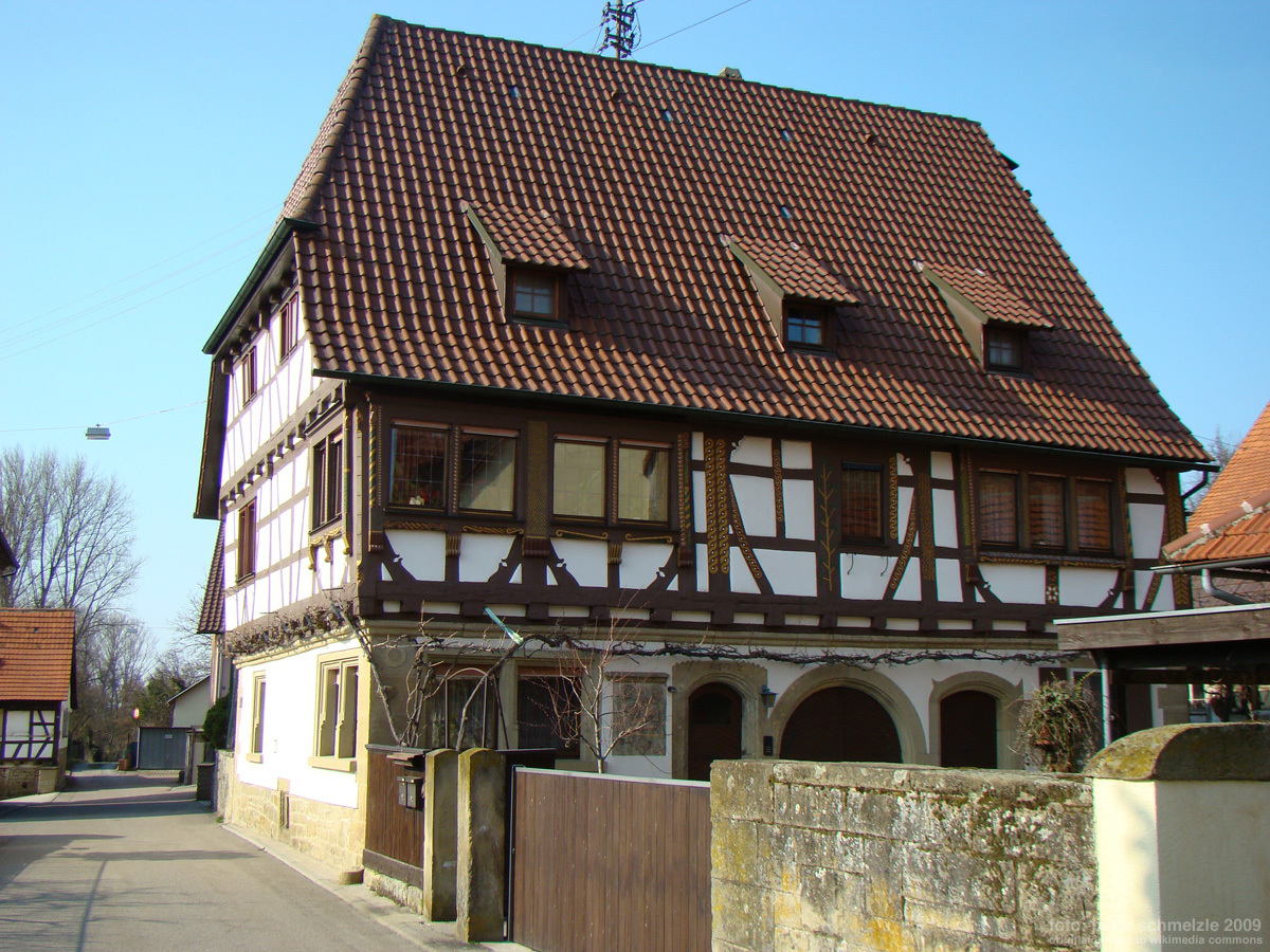 Historisches Fachwerkhaus in Eppingen-Mühlbach